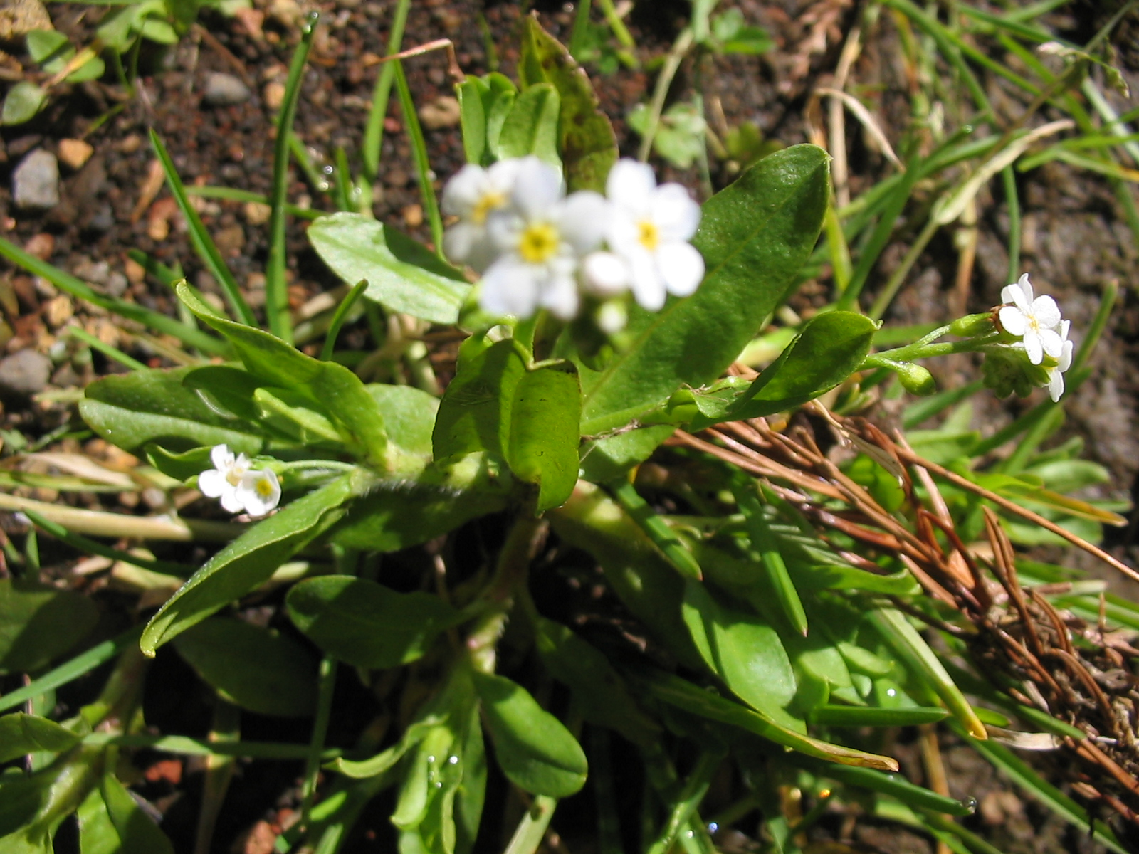 Ausläuferbildendes Vergissmeinnicht (Myosotis stolonifera) - habitus